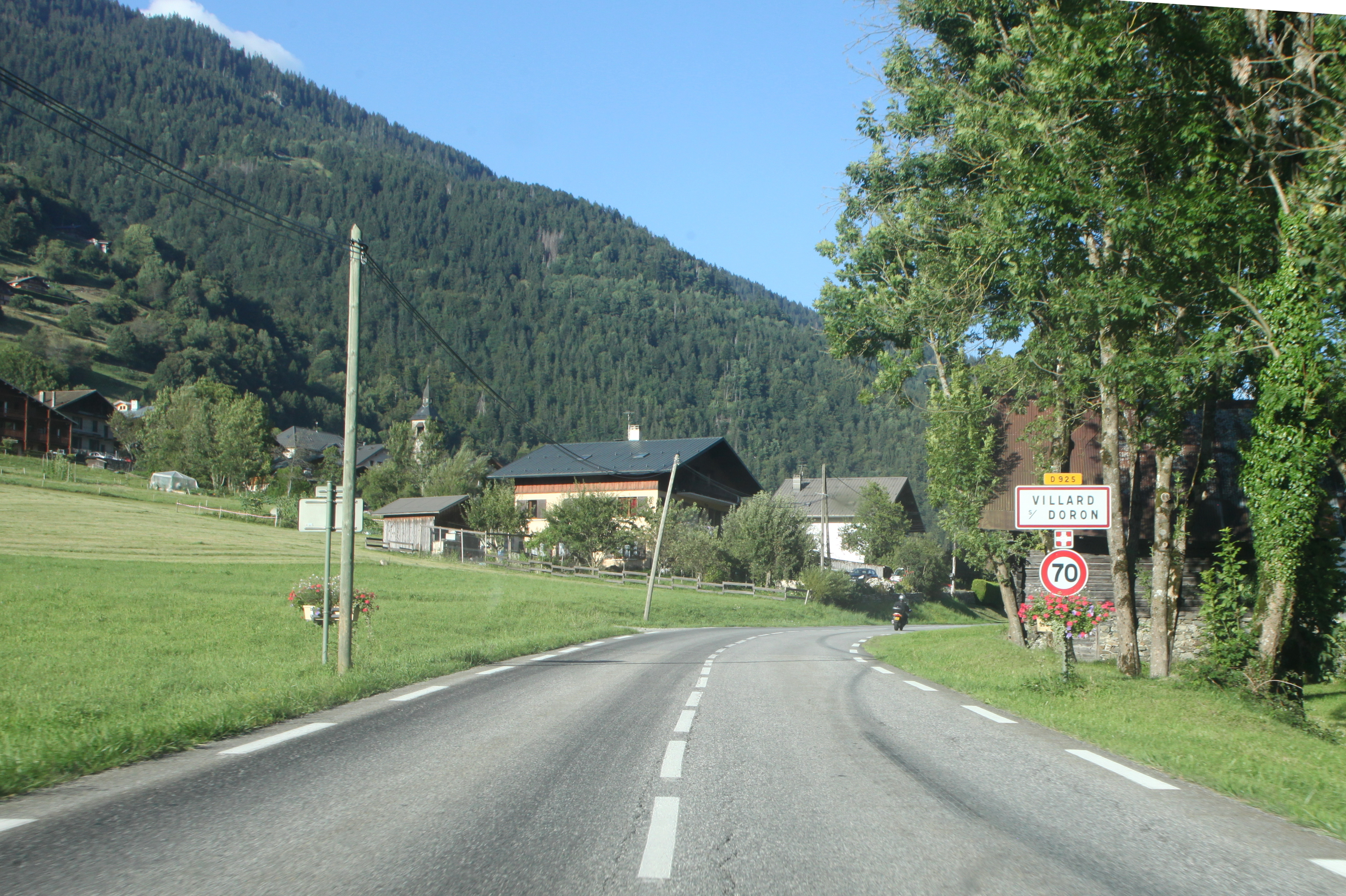 Entrée de Villard-sur-Doron (Savoie).